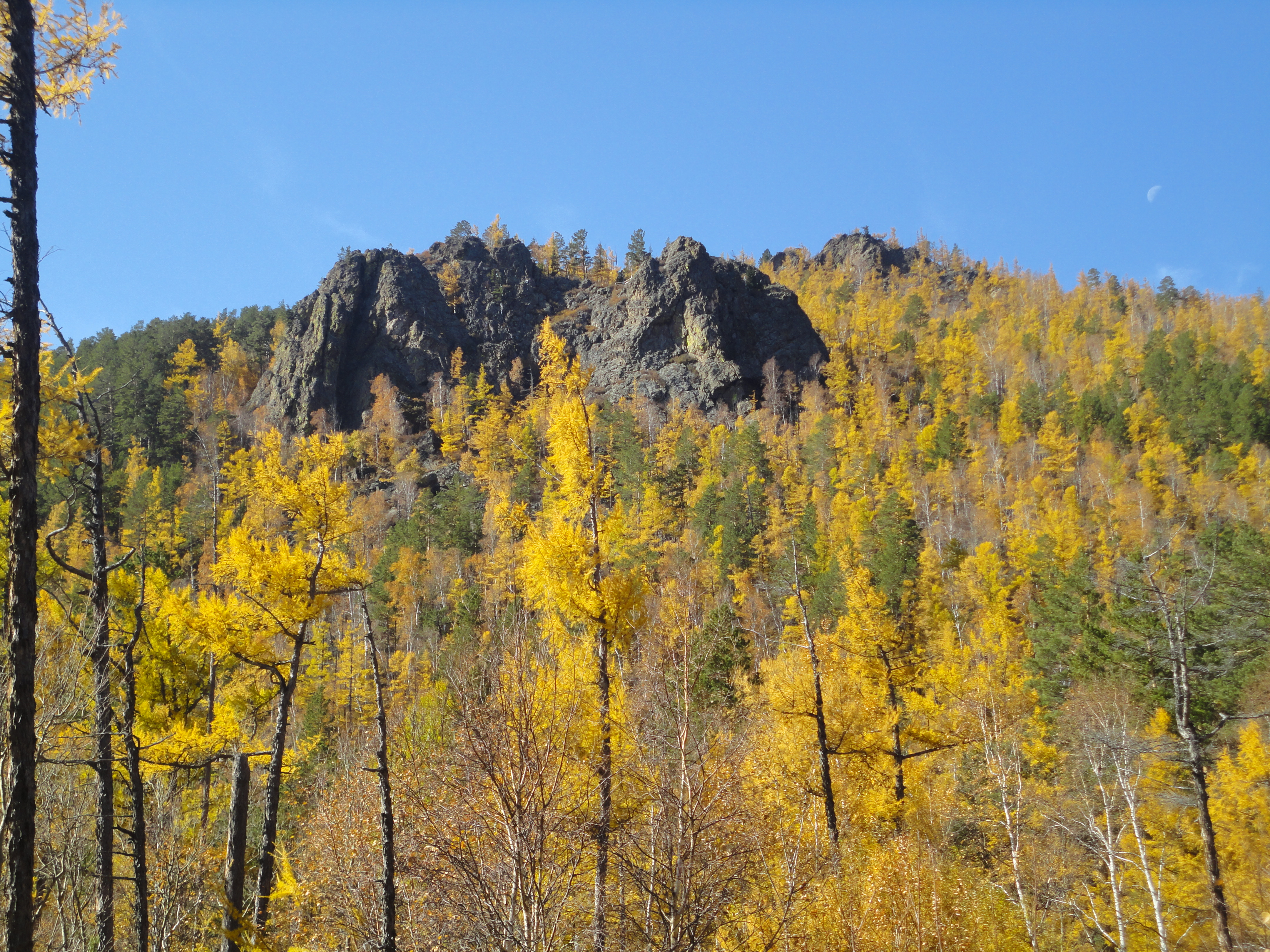 Алханай: Дульдургинский район, This image is related to the protected area of Russia number 7500031